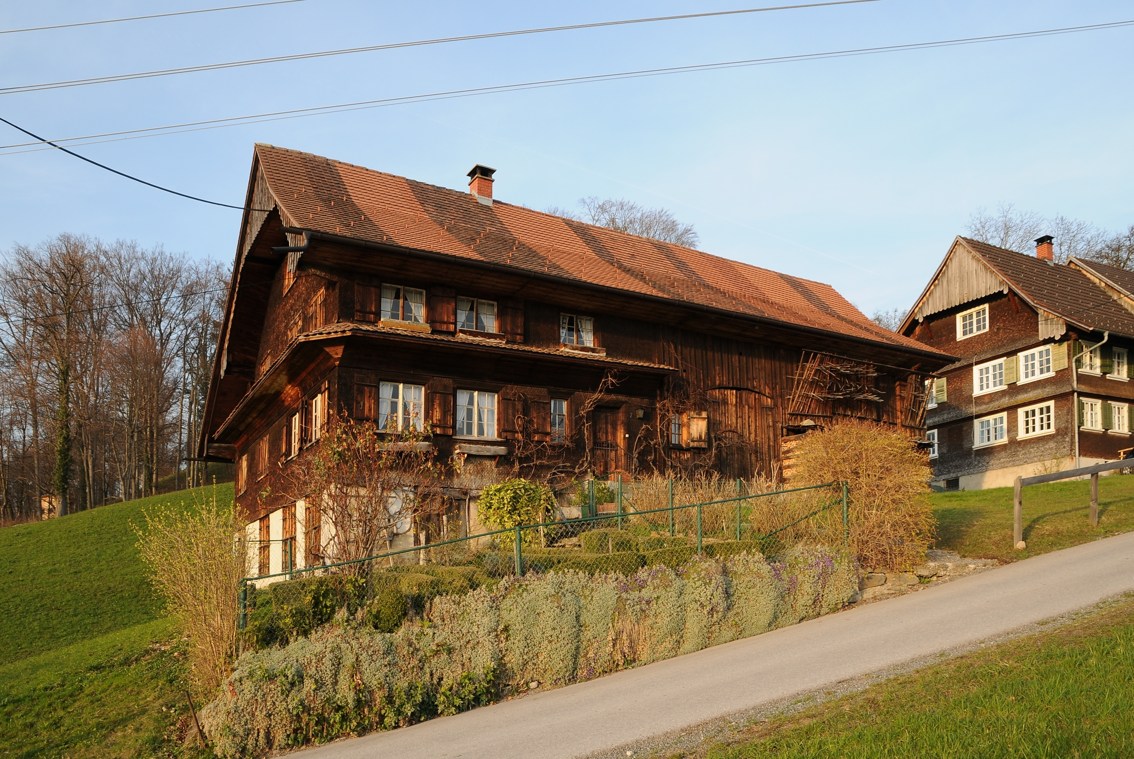 Bauernhaus "Unterfallenberg Nr.2" in Dornbirn Markt Das Haus steht unter Denkmalschutz.